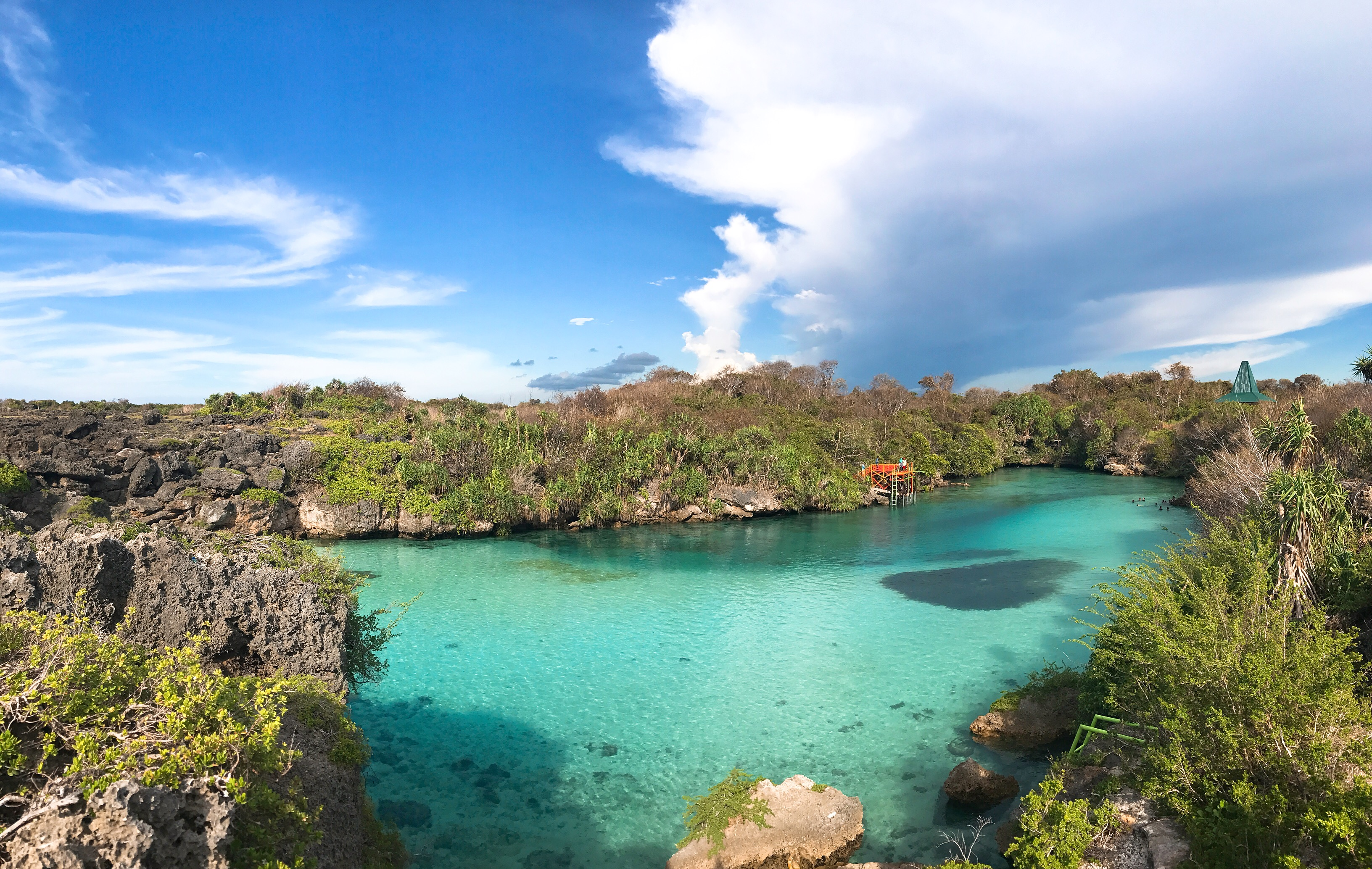 Weekuri Lagoon yang terletak di pulau Sumba, lebih tepatnya Sumba Barat Daya.